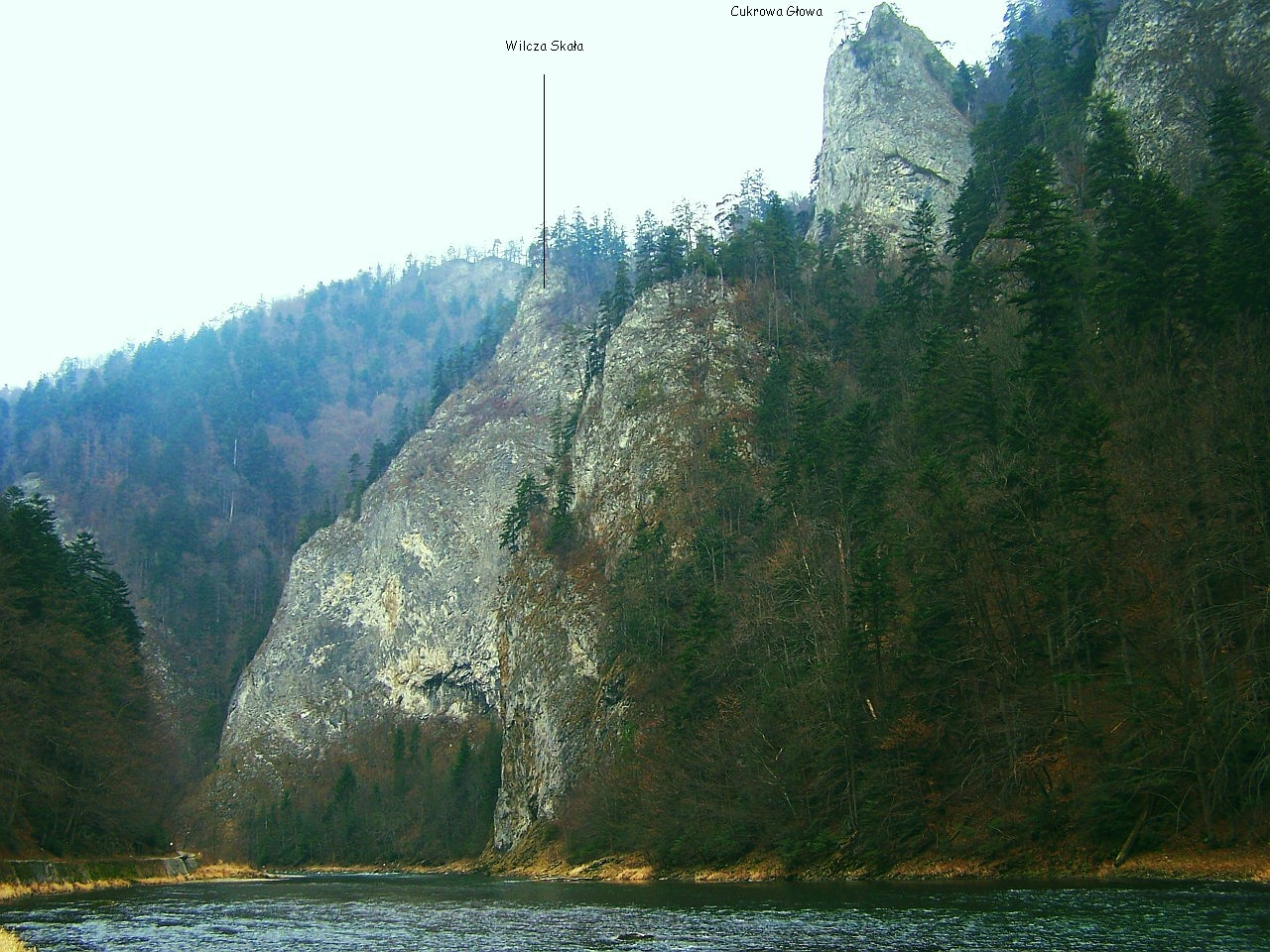 Wilcza Skała, Wilcze Spady i Cukrowa Głowa w Pieninach. Widok z Drogi Pienińskiej